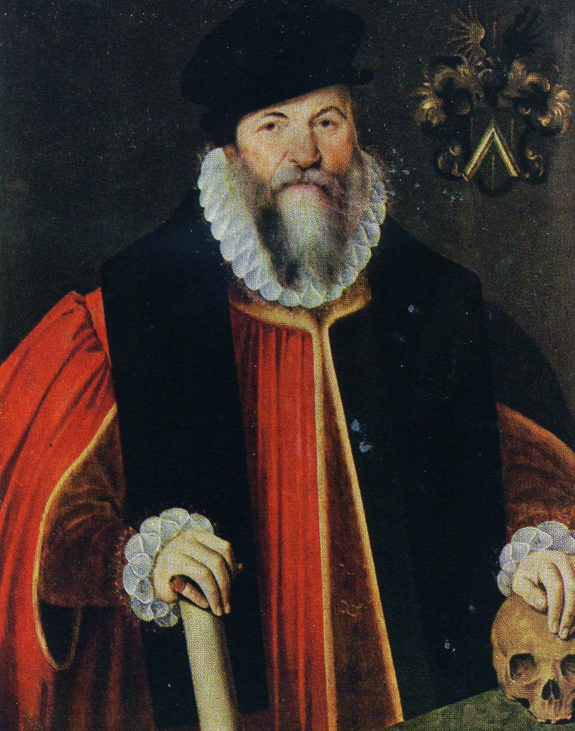 Gerhard Pilgrum, Kölner Bürgermeister 1571 (Zeughaus Köln)